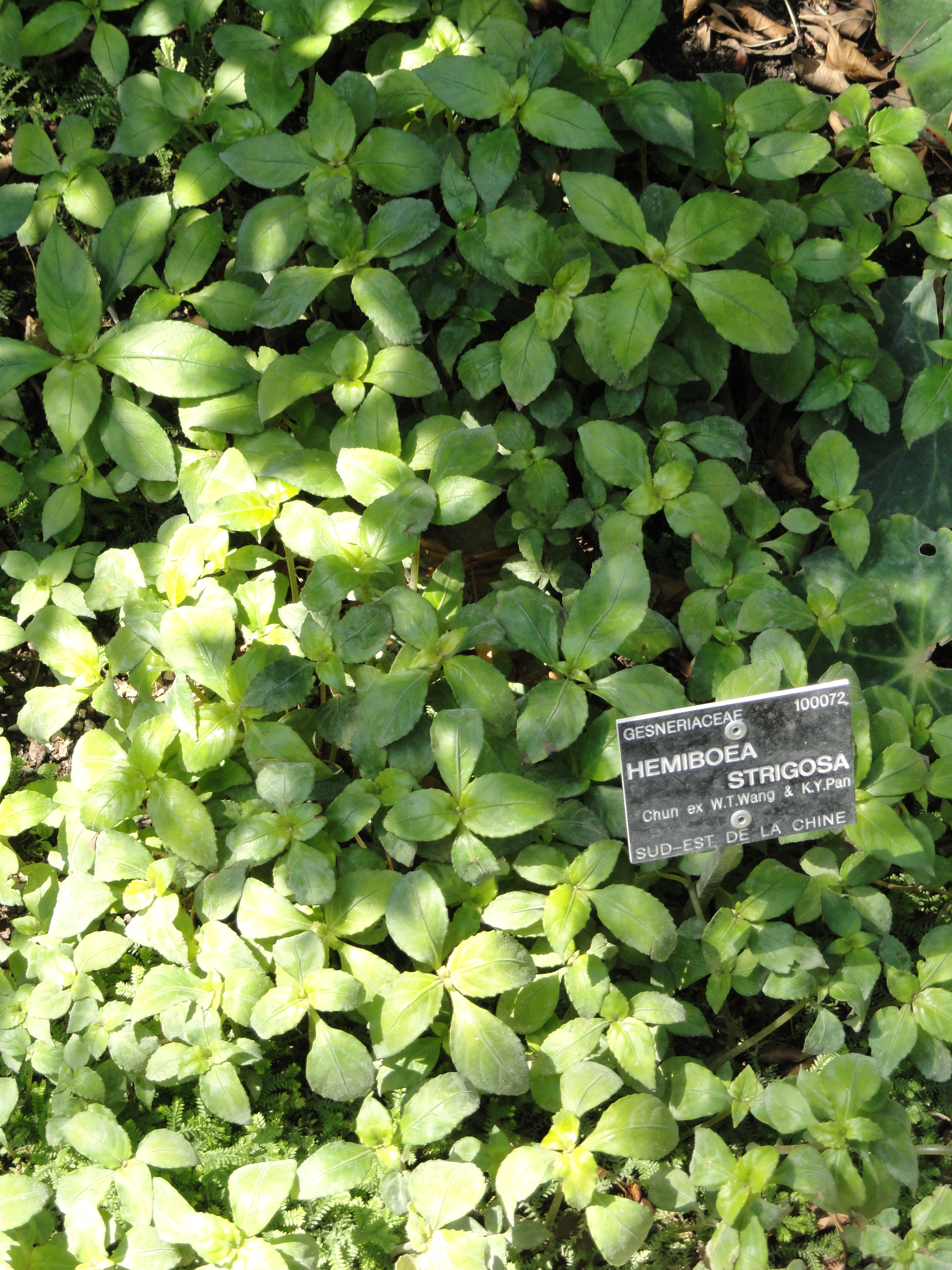 Hemiboea strigosa specimen in the Jardin Botanique de Lyon, Parc de la Tête d'Or, Lyon, France.